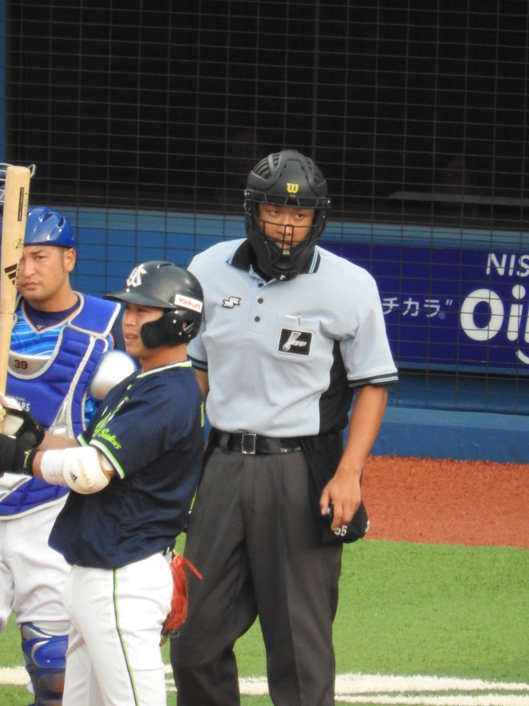 2019年7月31日横浜スタジアムにて